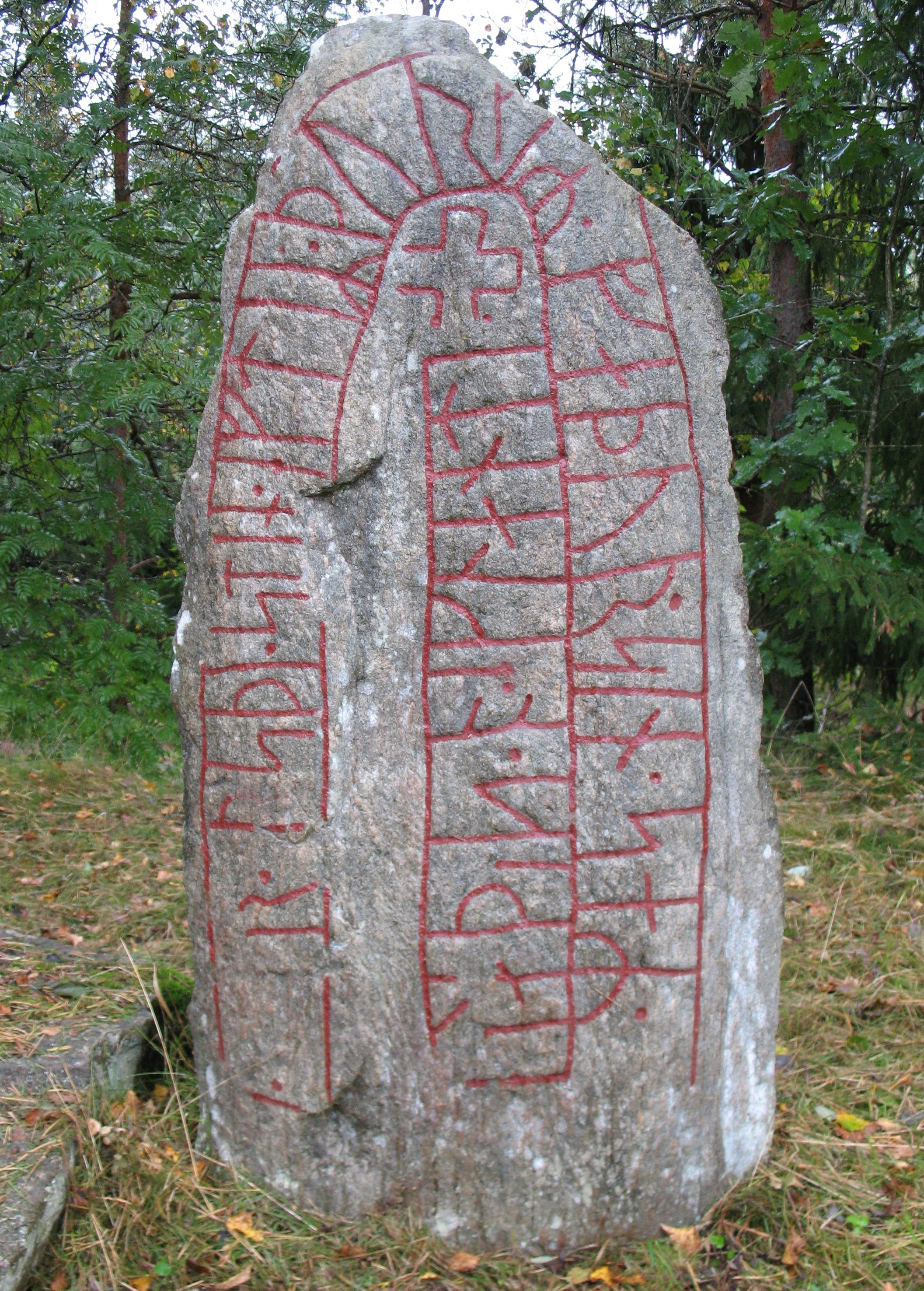 runestone Sm 29, Ingelstad.